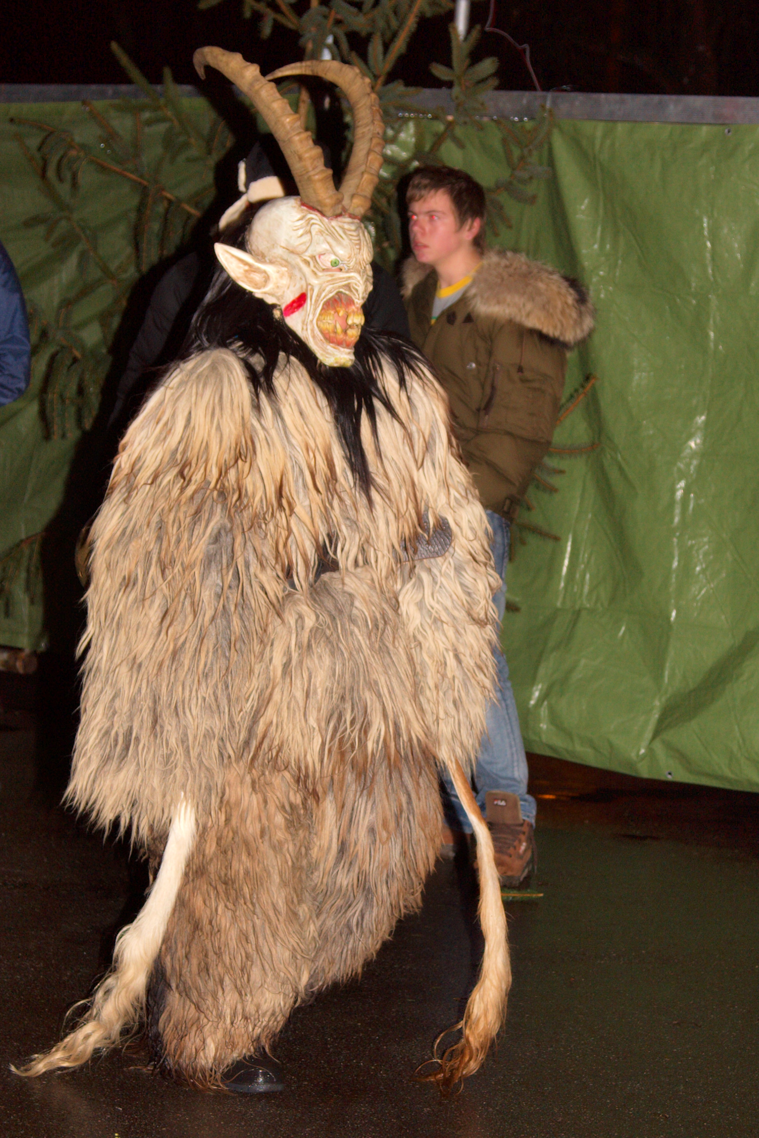 Krampus "Morzger Pass" Salzburg 2008